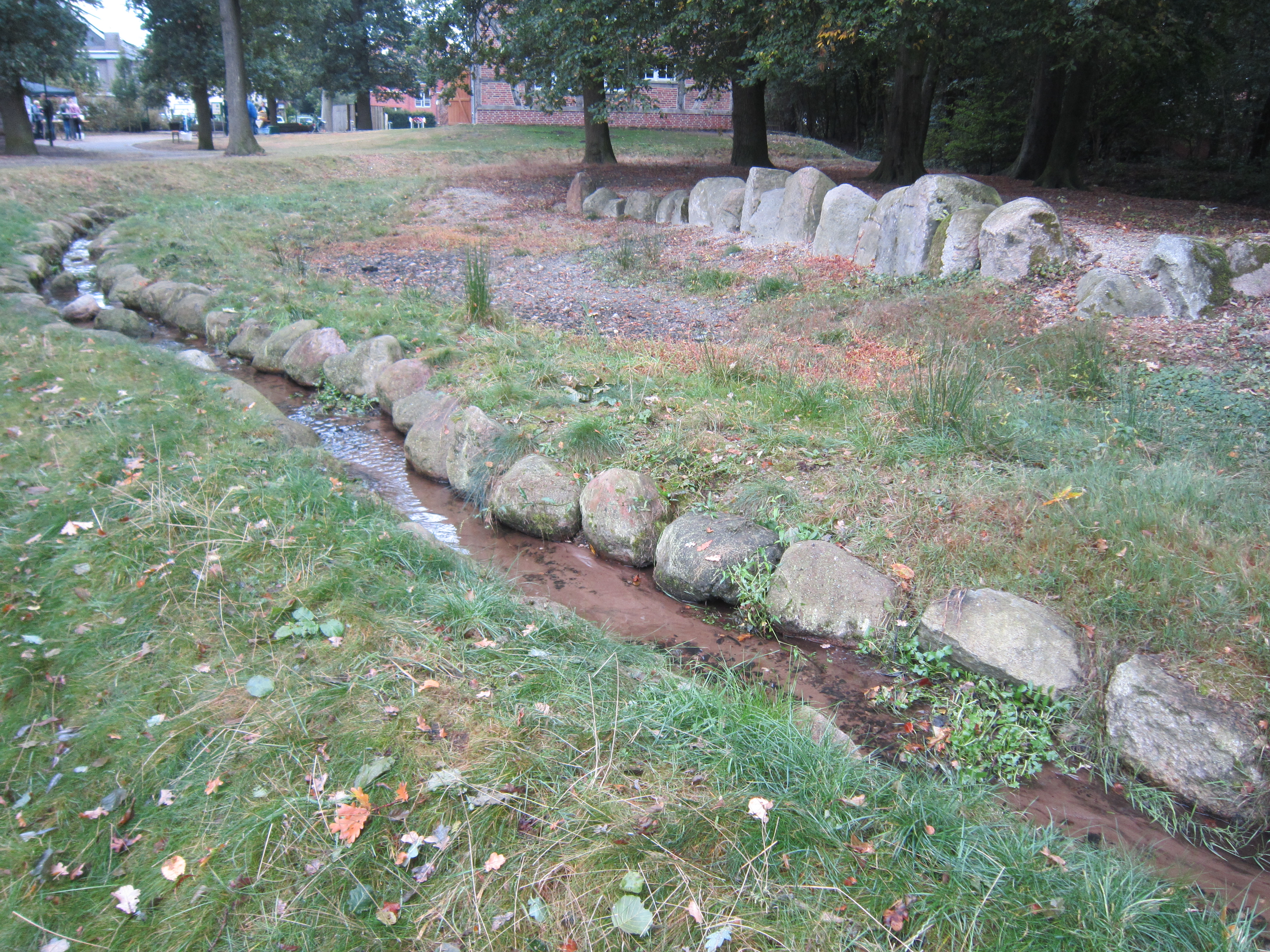 Steinfelder Bach unterhalb der Lohgerberei im Ortszentrum von Steinfeld (Oldenburg)